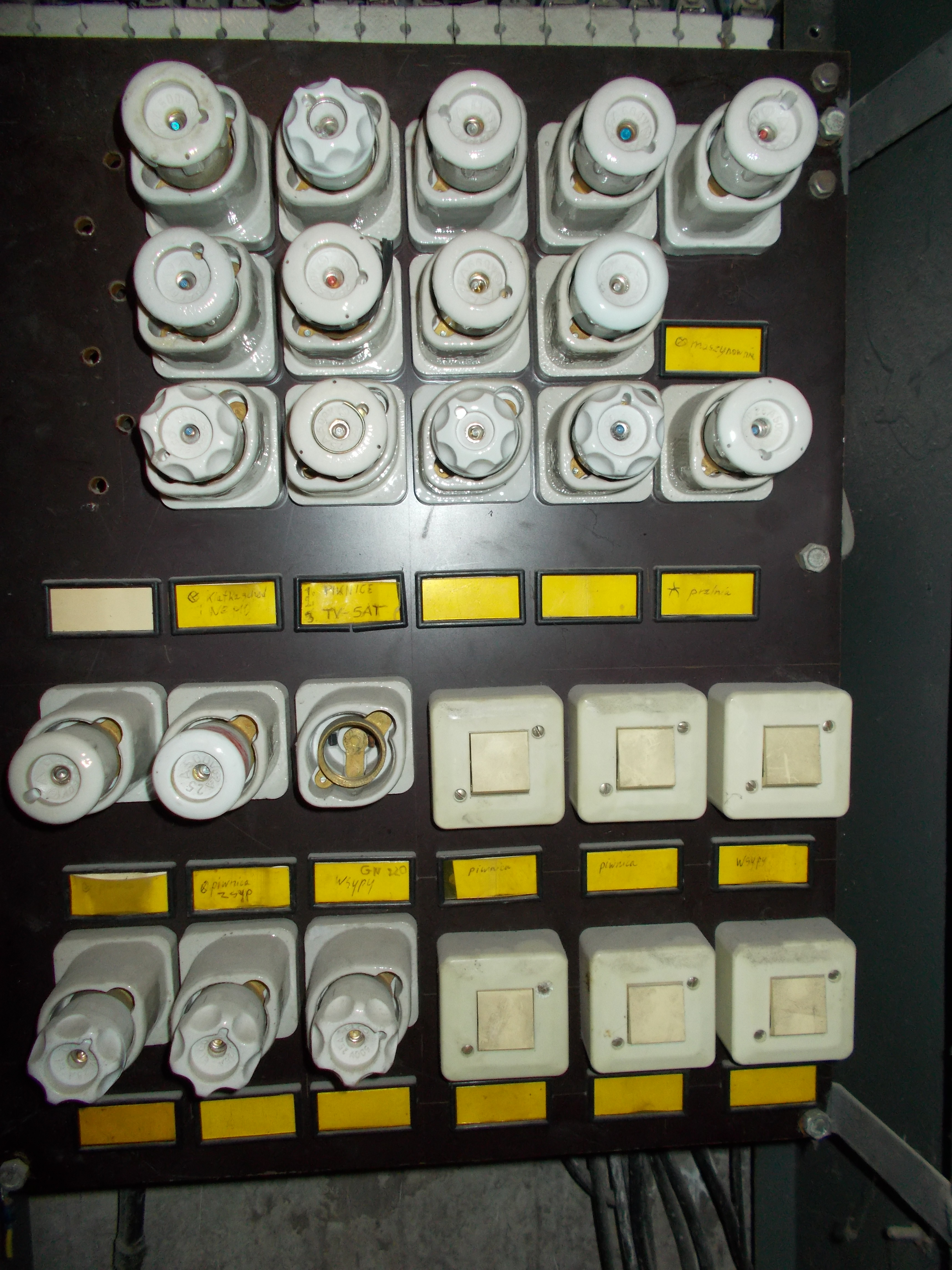 Rozdzielnica elektryczna tablicowa. Przykład rozdzielnicy administracyjnej w budynku wielorodzinnym (bloku mieszkalnym).